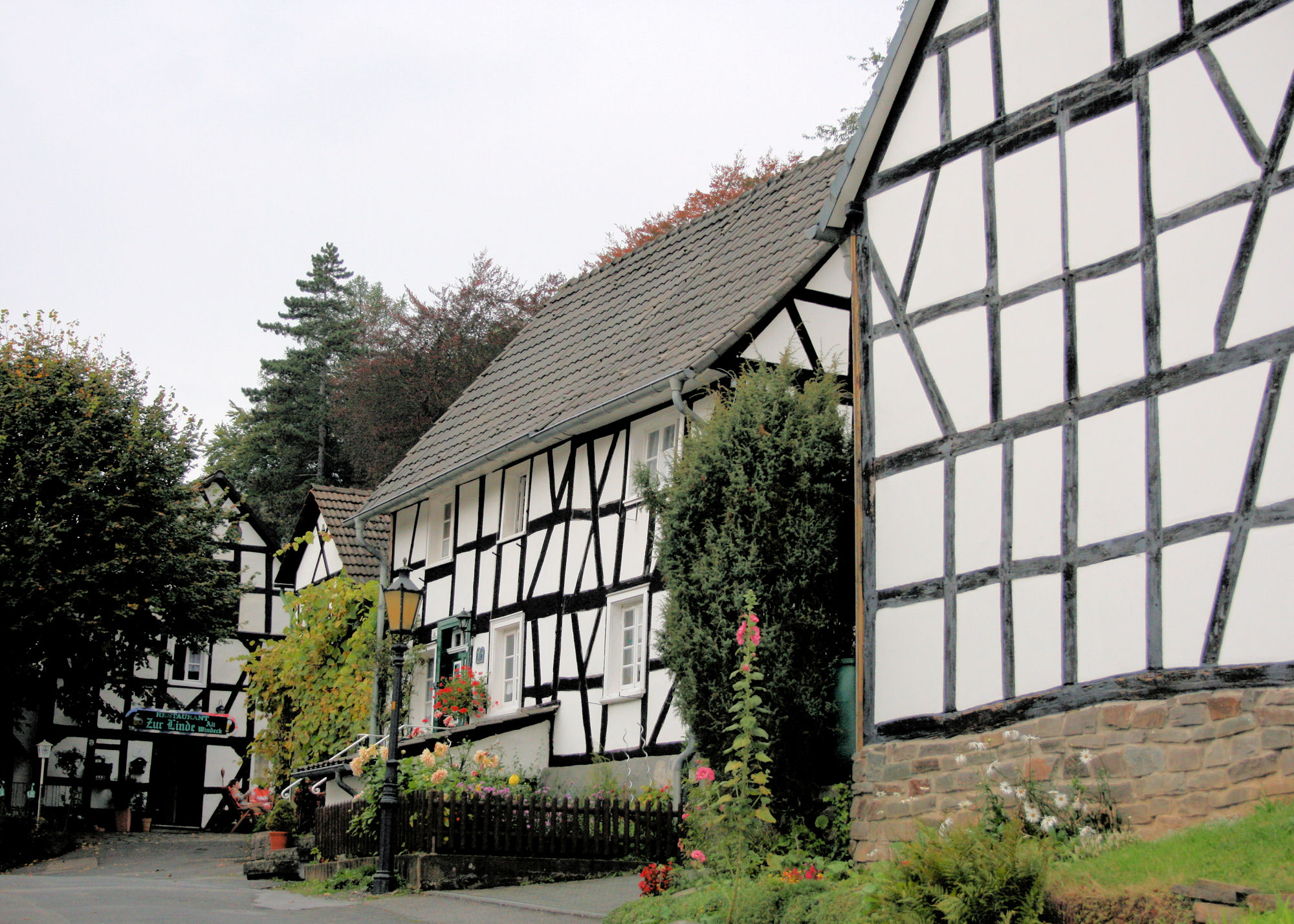 Windeck-Altwindeck